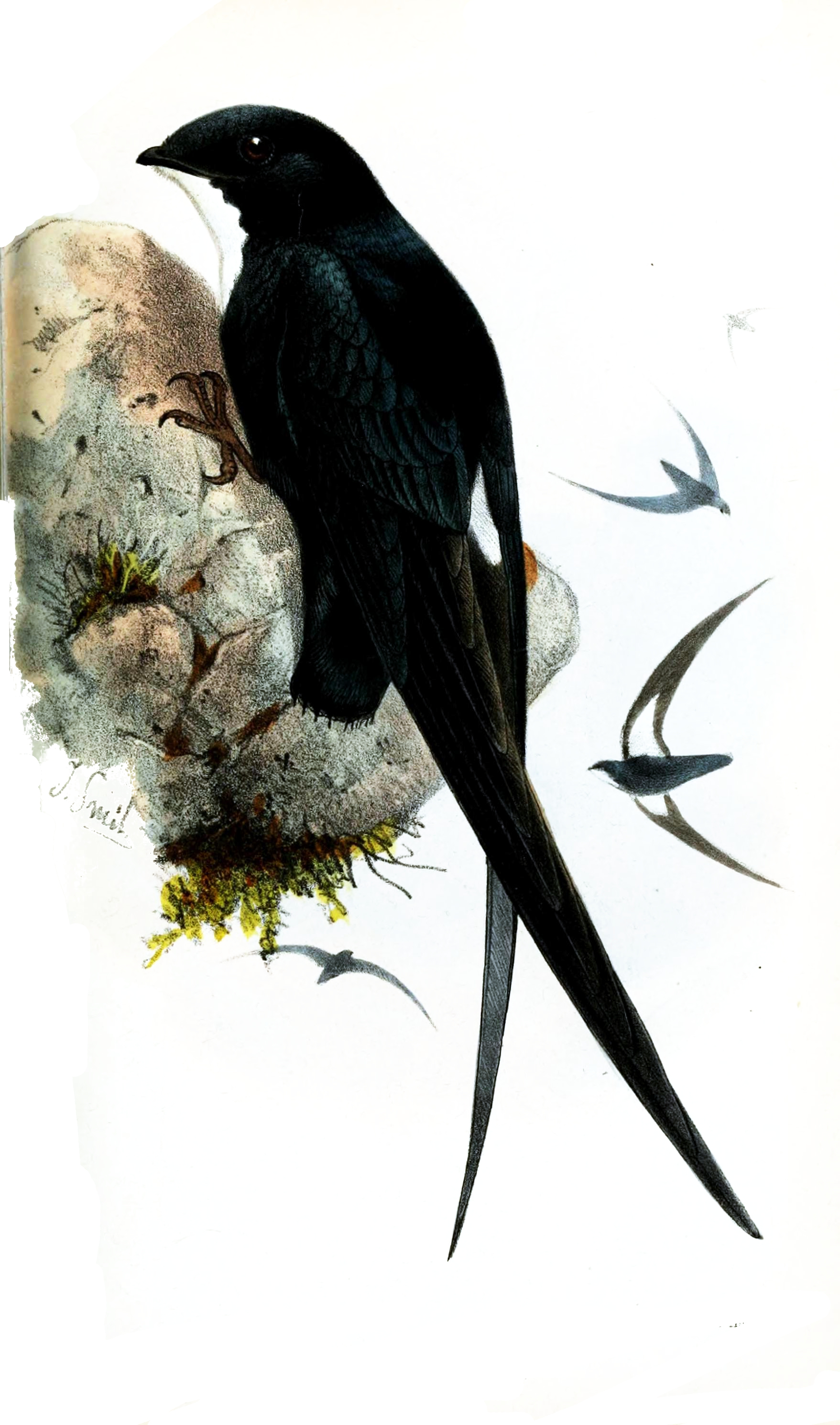 Chaetura picina = Mearnsia picina